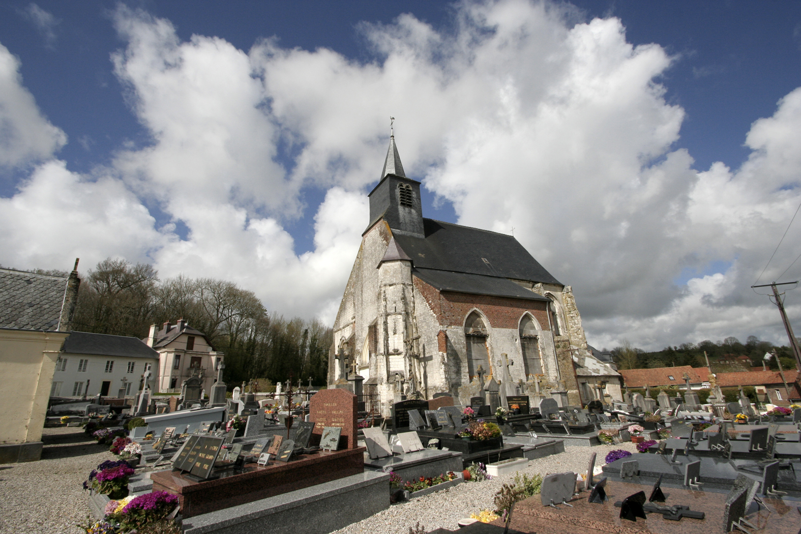 Montcavrel église .